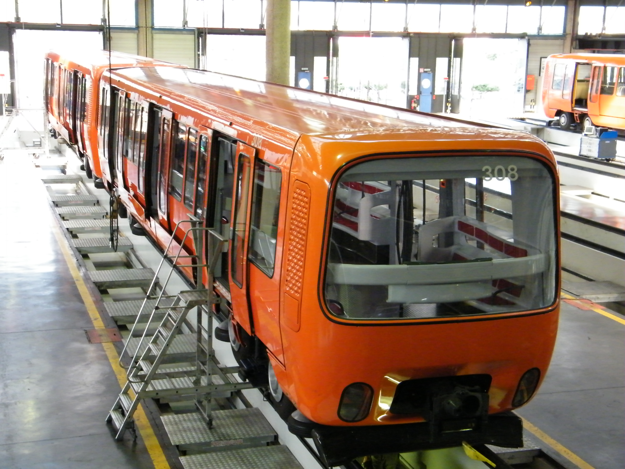 Rame MPL85 aux ateliers de la ligne D du métro de Lyon, Thioley, exposée lors des Journées Européennes du Patrimoine 2009.